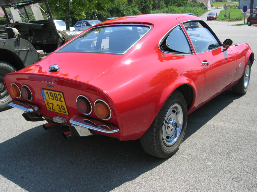 Opel GT 1900